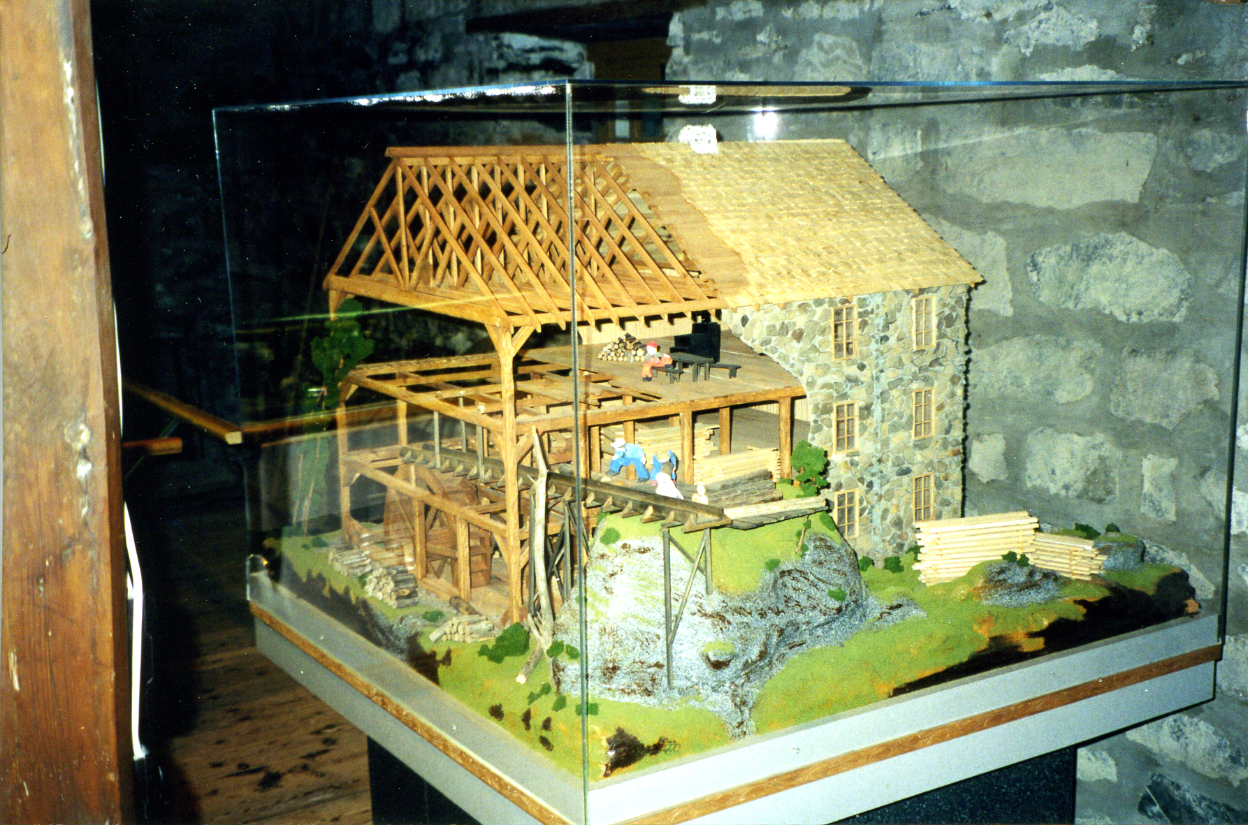 Maquette du Moulin de Saint-Roch-des-Aulnaies (Chaudière-Appalaches, Québec). Moulin à eau; moulin à farine.